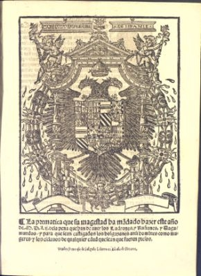 La Prematica que su Magestad ha mandado hazer este año M.D.LII de la pena que ha de haber los Ladrones, y Rufianes, y Vagabundos, y para que sean castigados los holgazanes así hombres como mujeres y los esclavos de qualquier edad que sean que fueran presos